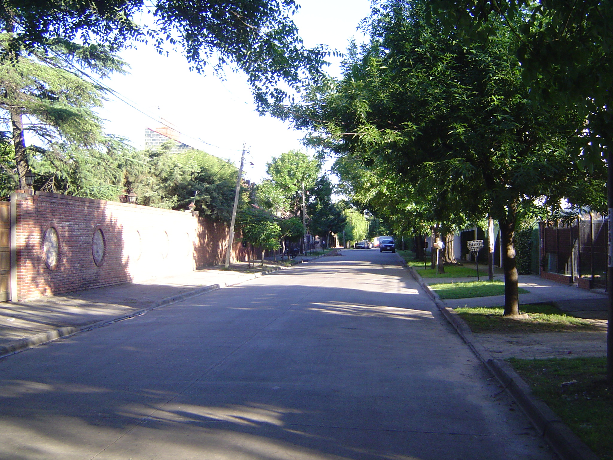 Calle de la localidad de Martin Coronado, Partido de Tres de Febrero, Buenos Aires, Argentina